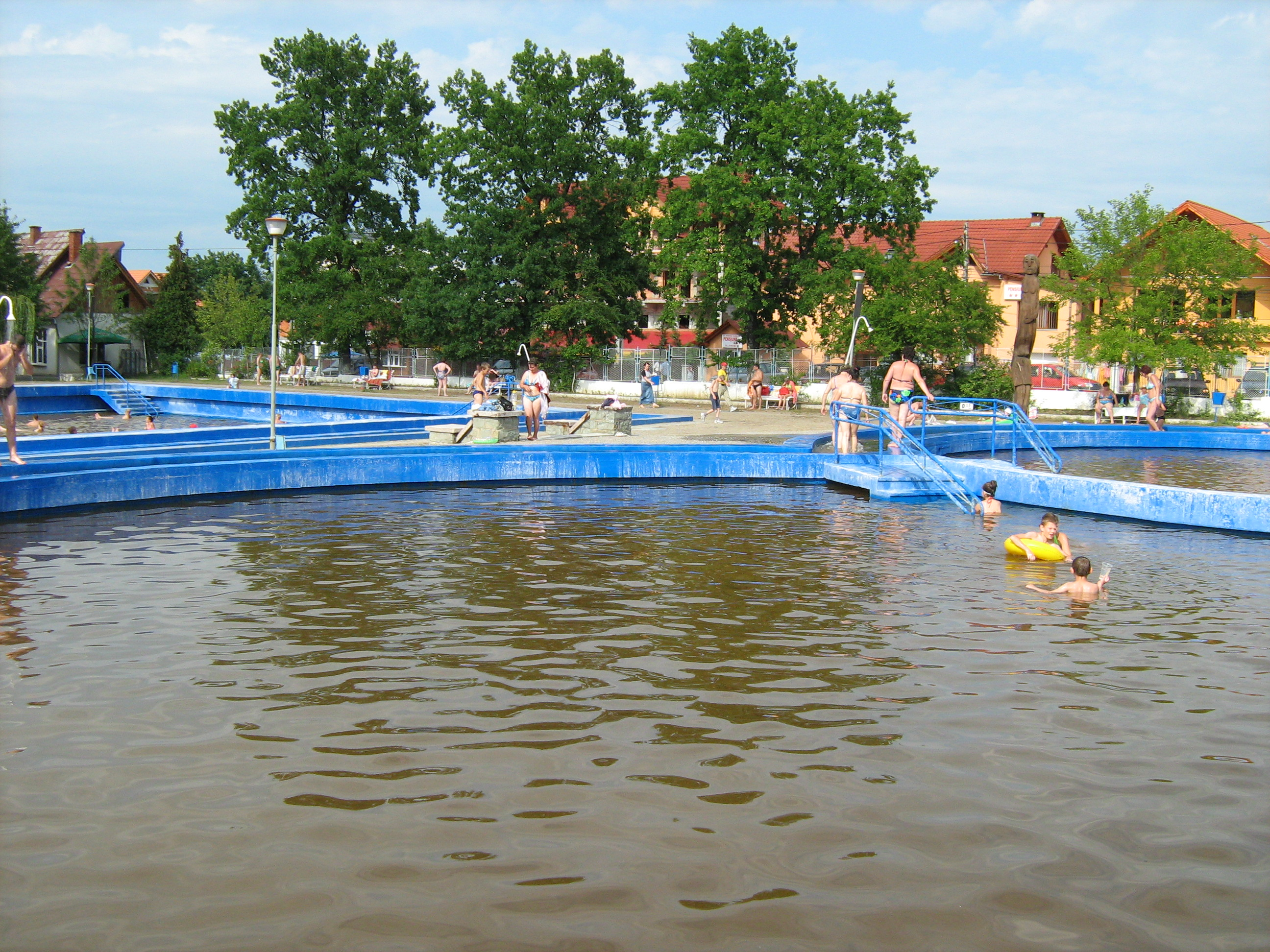 Ocna Şugatag spa, Romania